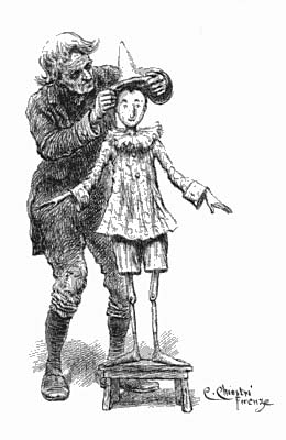 Geppetto veste Pinocchio. Illustrazione di Carlo Chiostri (1863 - 1939) dal libro di Collodi "Le avventure di Pinocchio", 1901